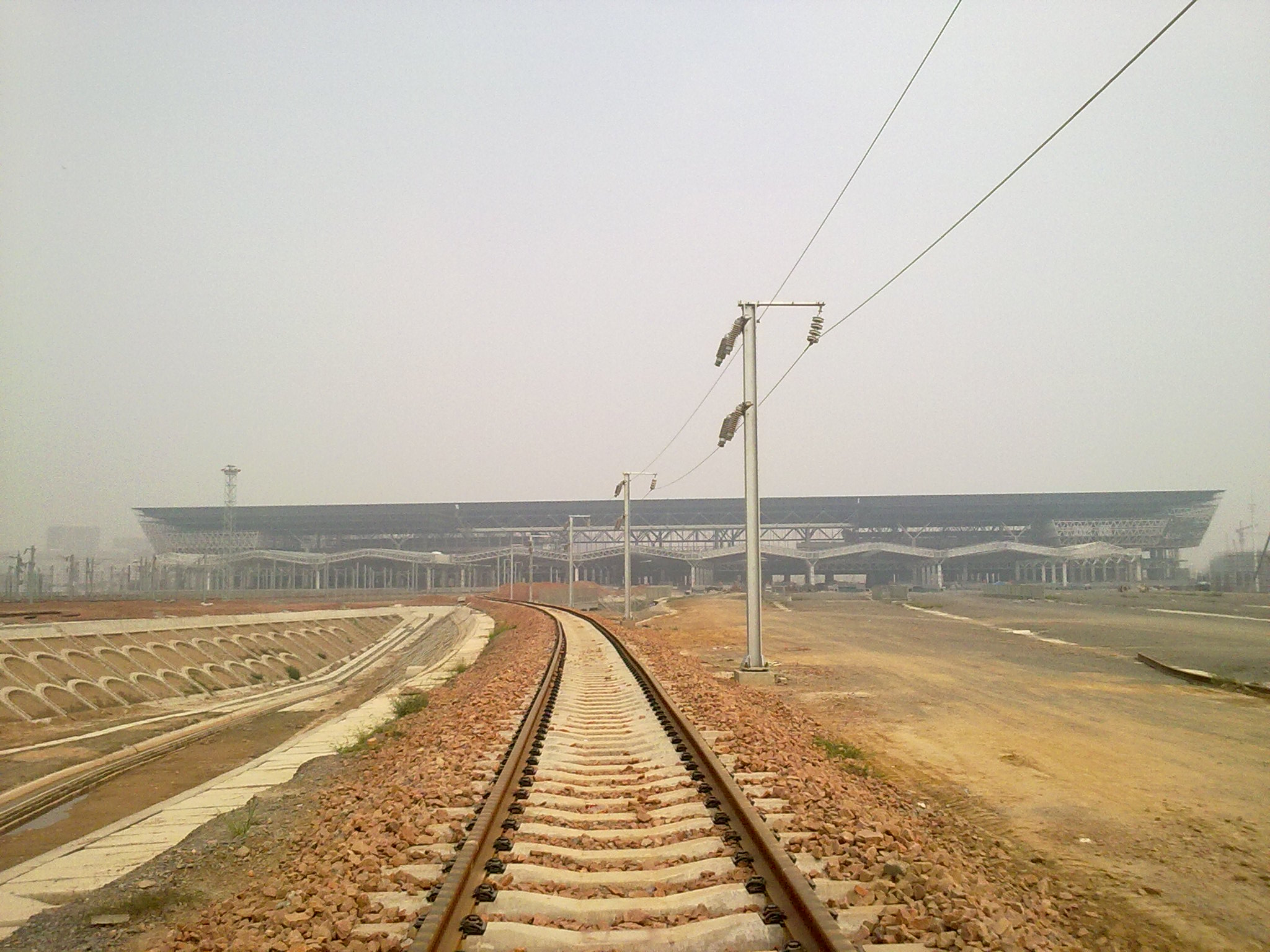 远看建设中的郑州东站